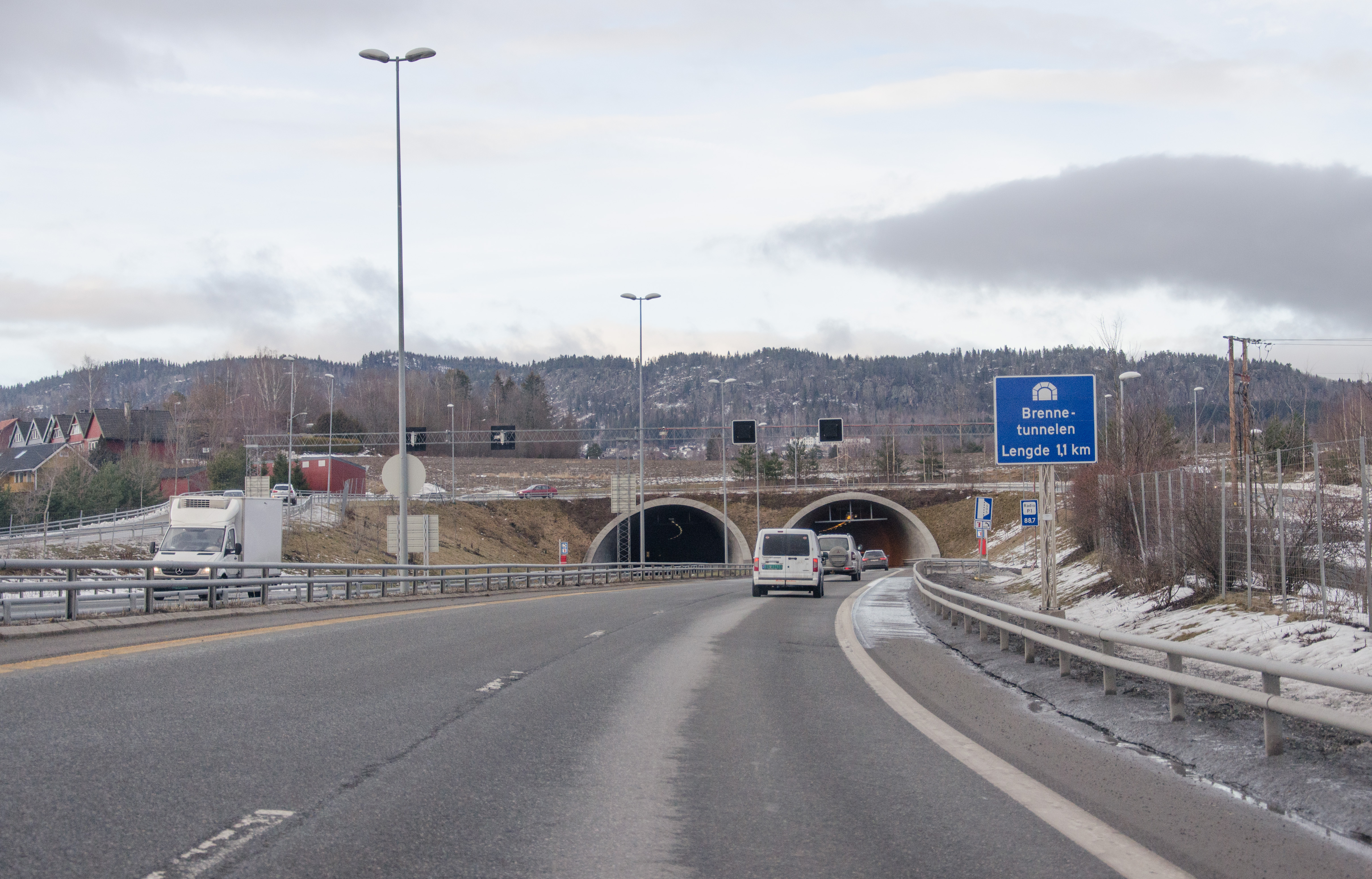 Brennetunnelen